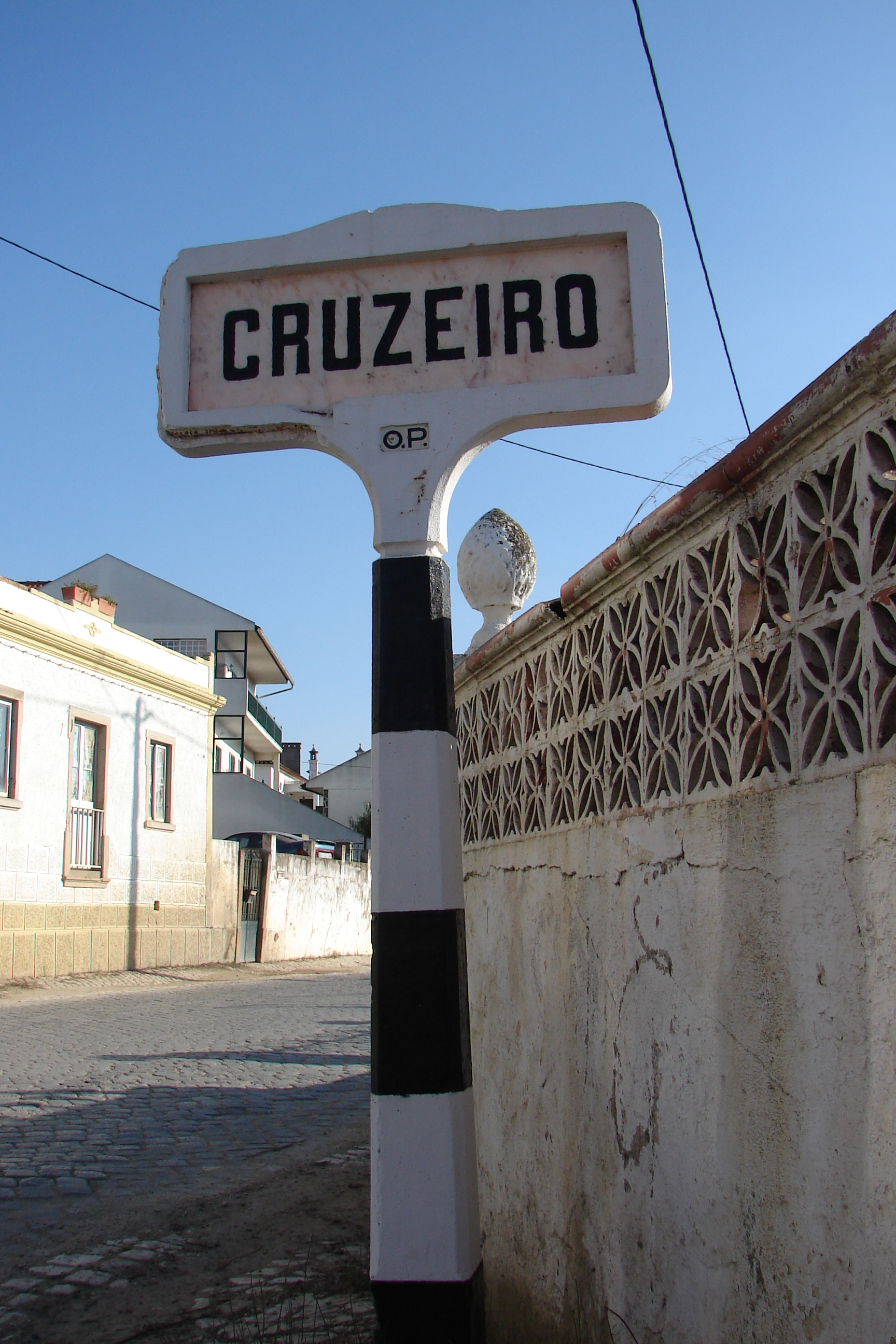 Placa do Cruzeiro (Olhalvo)